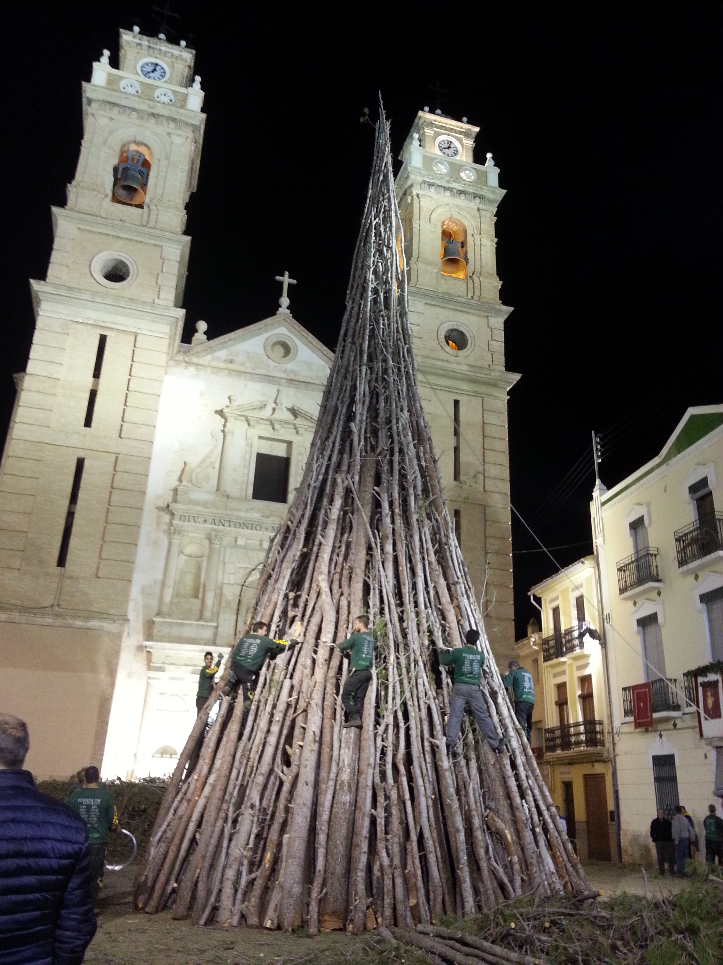 Festers muntant la foguera de Sant Antoni enfront de l'església de Sant Antoni Abat (Canals)